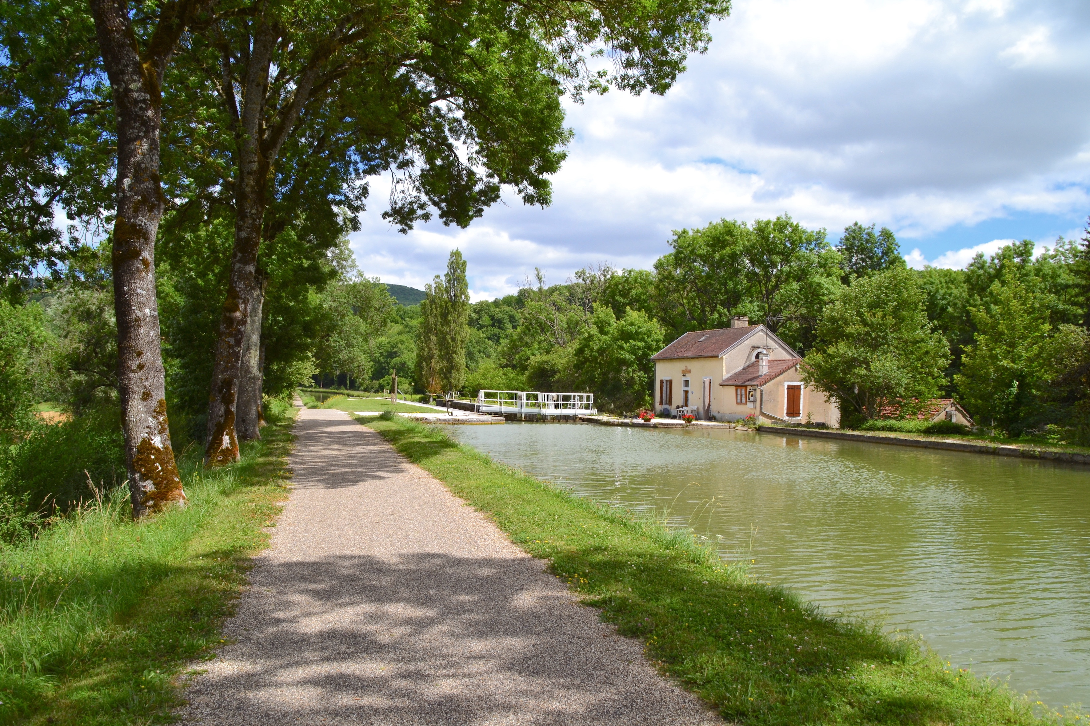 Canal de Bourgogne, amont de l'écluse d'Ouche